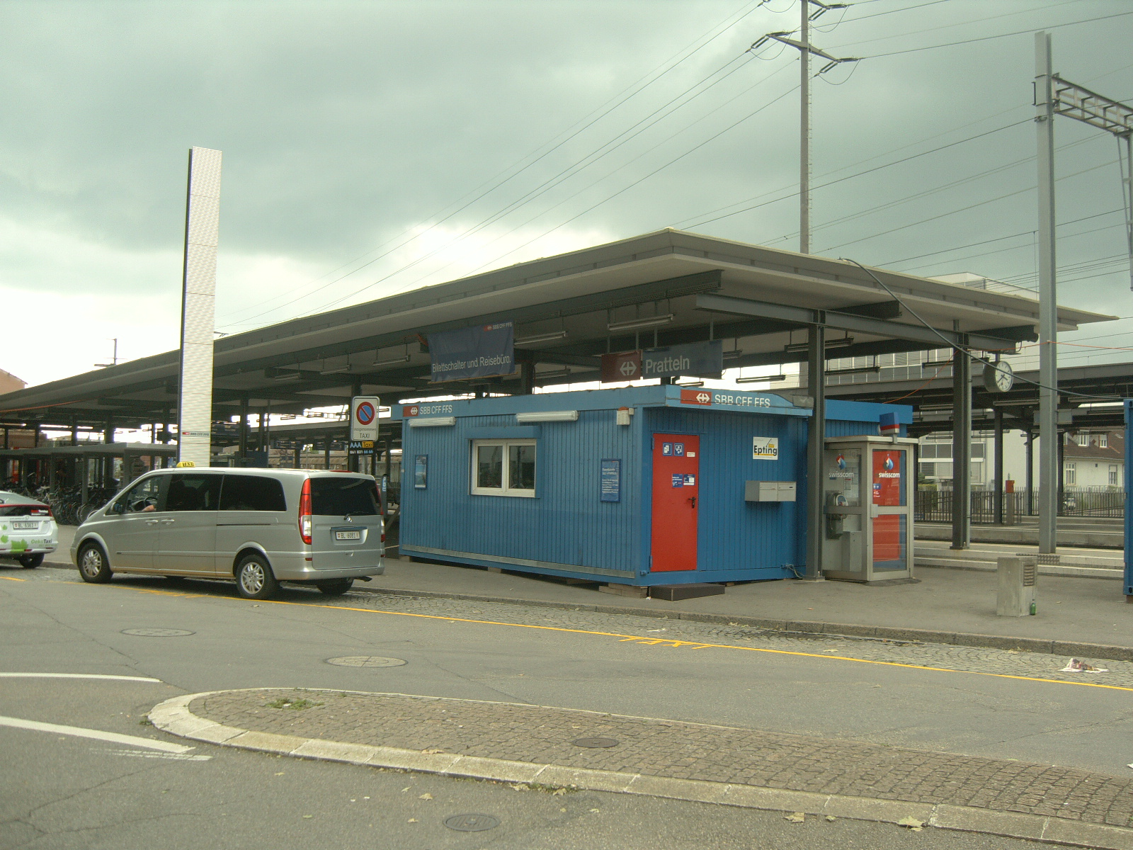 Bahnhof Pratteln